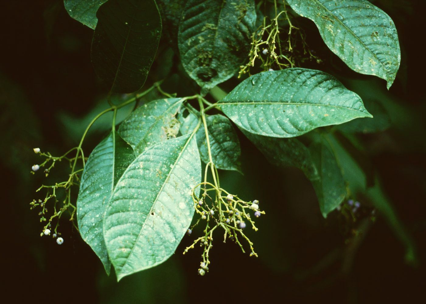 Psychotria solitudinum, Kaffeegewächse (Rubiaceae) - Costa Rica: Prov. Puntarenas, Quebrada El Chorro bei La Gamba, NW Golfito